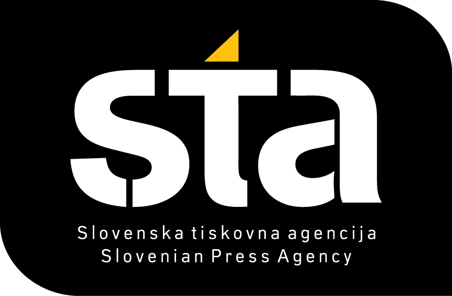 Logotip Slovenske tiskovne agencije